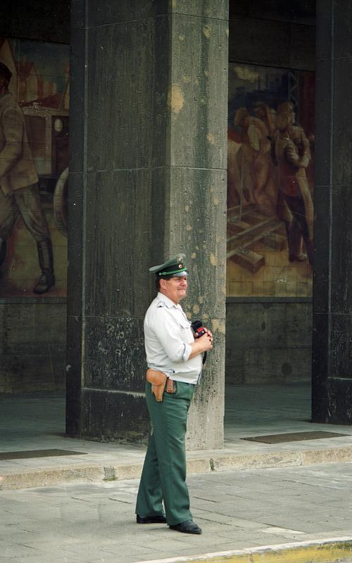 22.7.1991 Berlin-Mitte Polizist in alter DDR-Uniform vor dem Gebäude der Treuhandanstalt in der Leipziger Straße